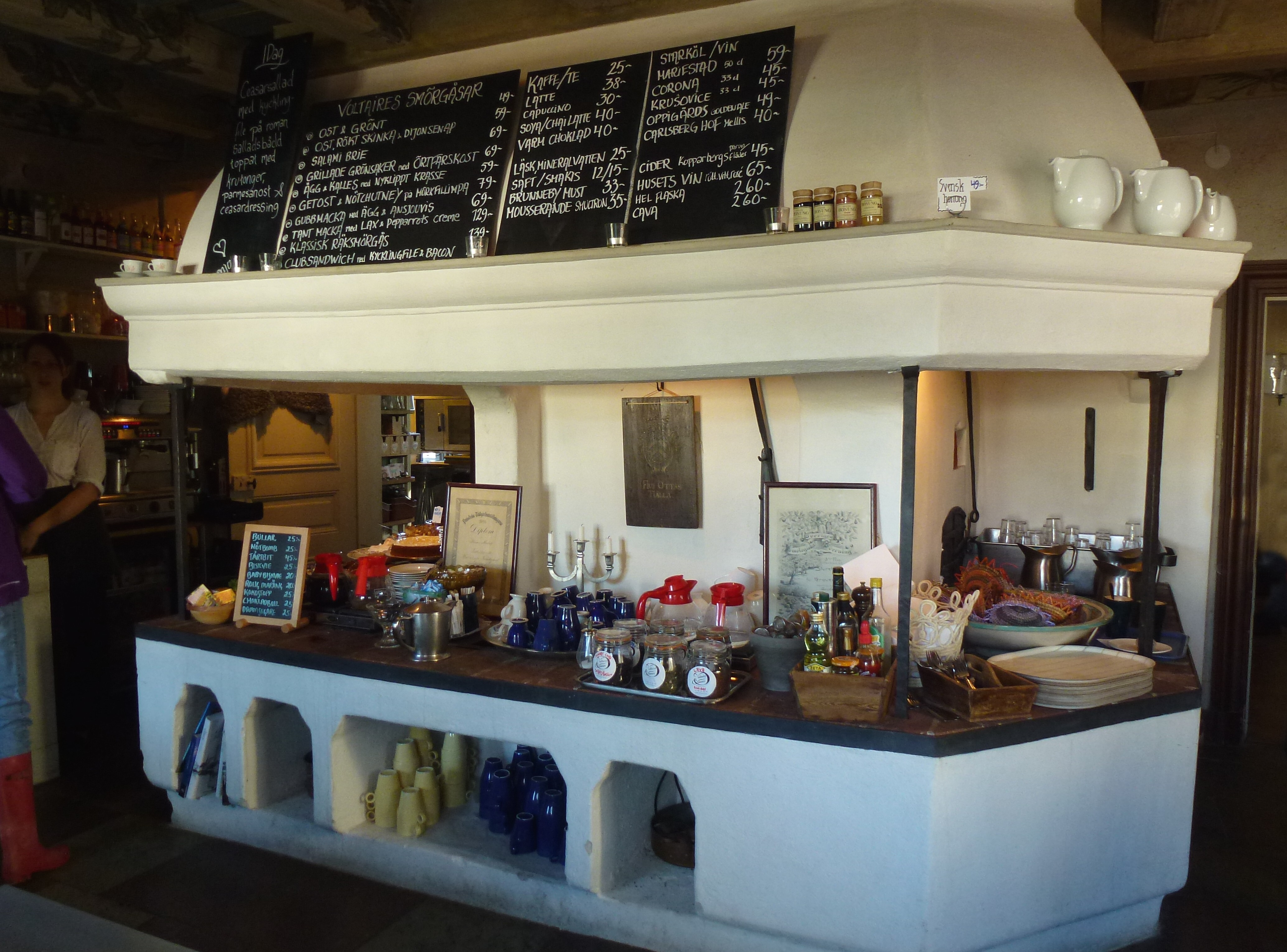 Sturehov cafe (f.d. slottsköket)